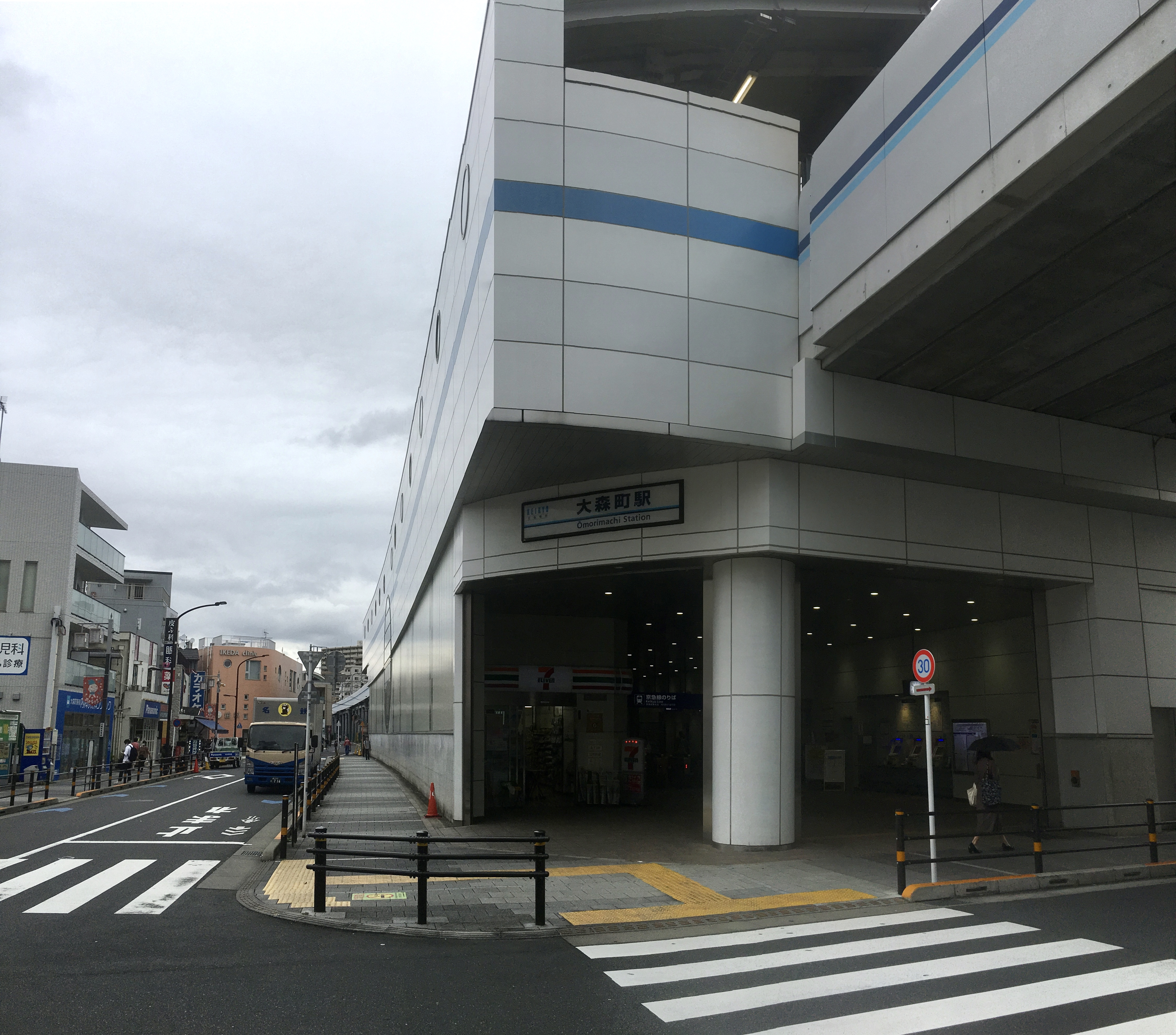 大森町駅 (Ōmorimachi Station)